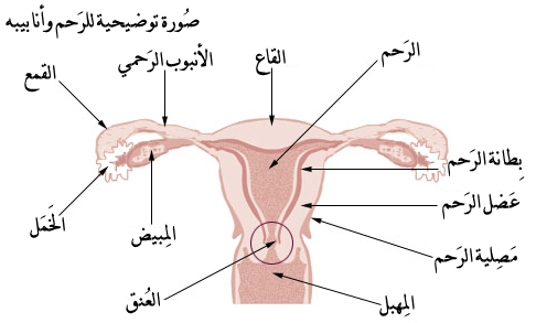 صُورة للرحم وأنابيبه